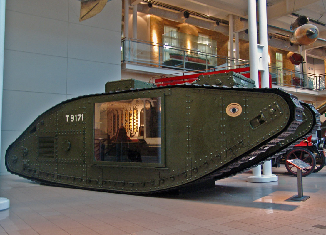 Tanque Primera Guerra Mundial (War Museum, Londres)